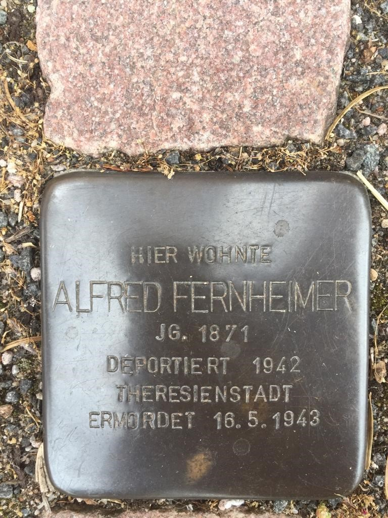 Stolperstein